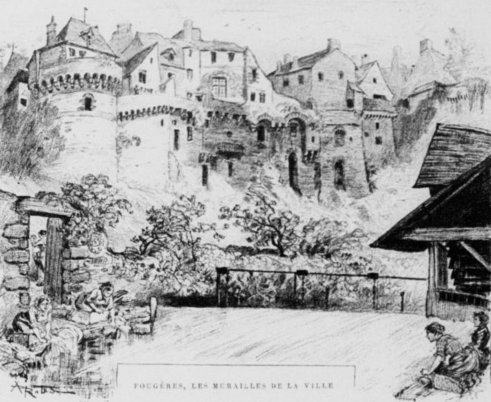 Fougères : les murailles de la ville (lithographie d'Albert Robida publiée dans "La vieille France, Bretagne" vers 1900). La tour Nichot et les remparts sud et ouest.